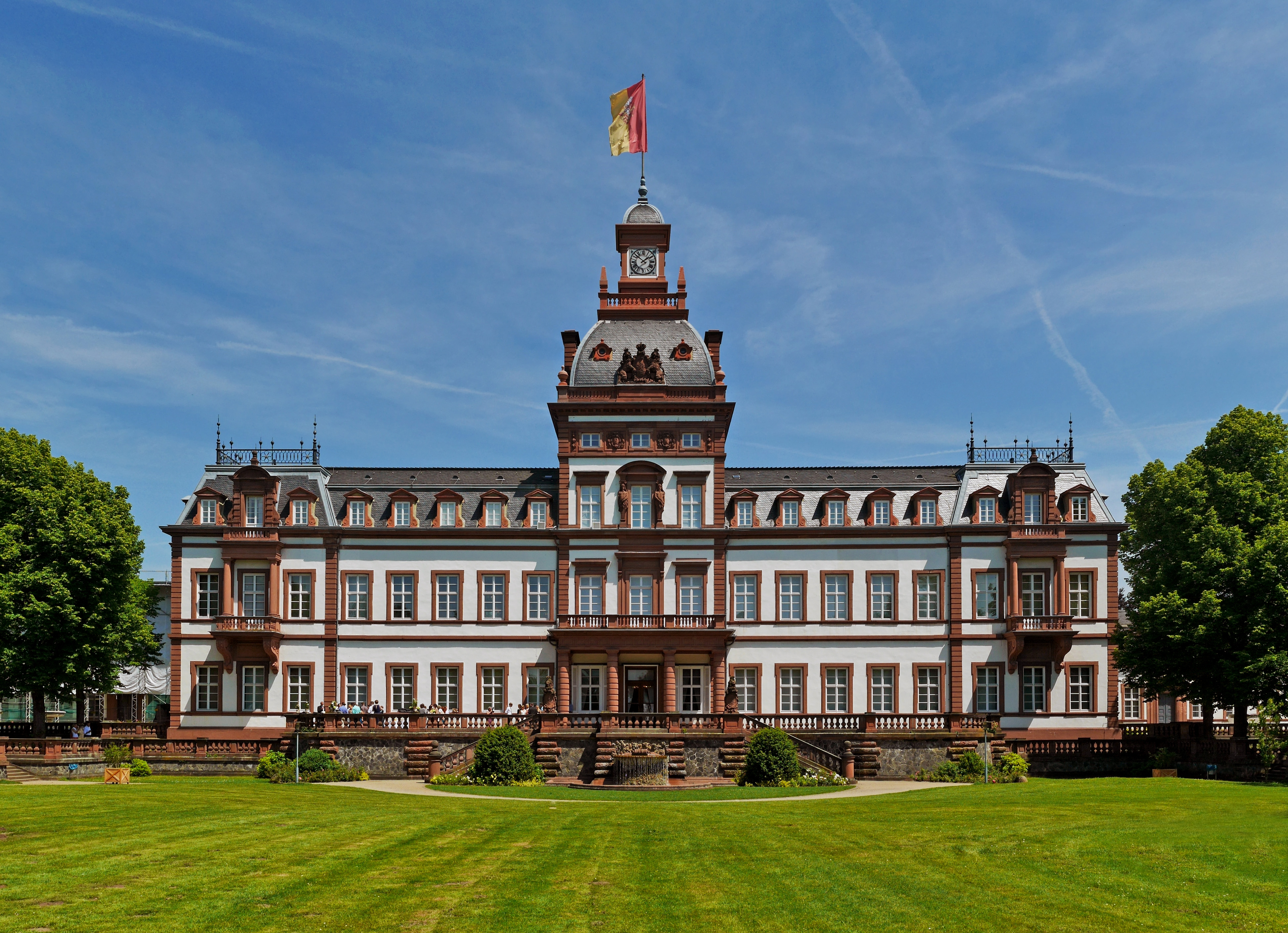 Schloss Philipsruhe liegt bei Kesselstadt im Westen der Stadt Hanau. Errichtet wurde es etwa 1700 bis 1725 für den Hanauer Grafen Philipp Reinhard. Das Schloss ist von einem englischen Landschaftspark umgeben.